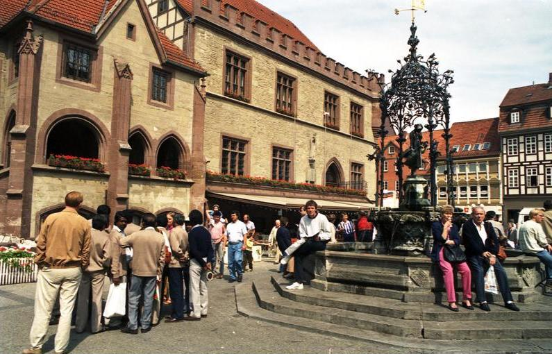 Juni 1988 Göttingen